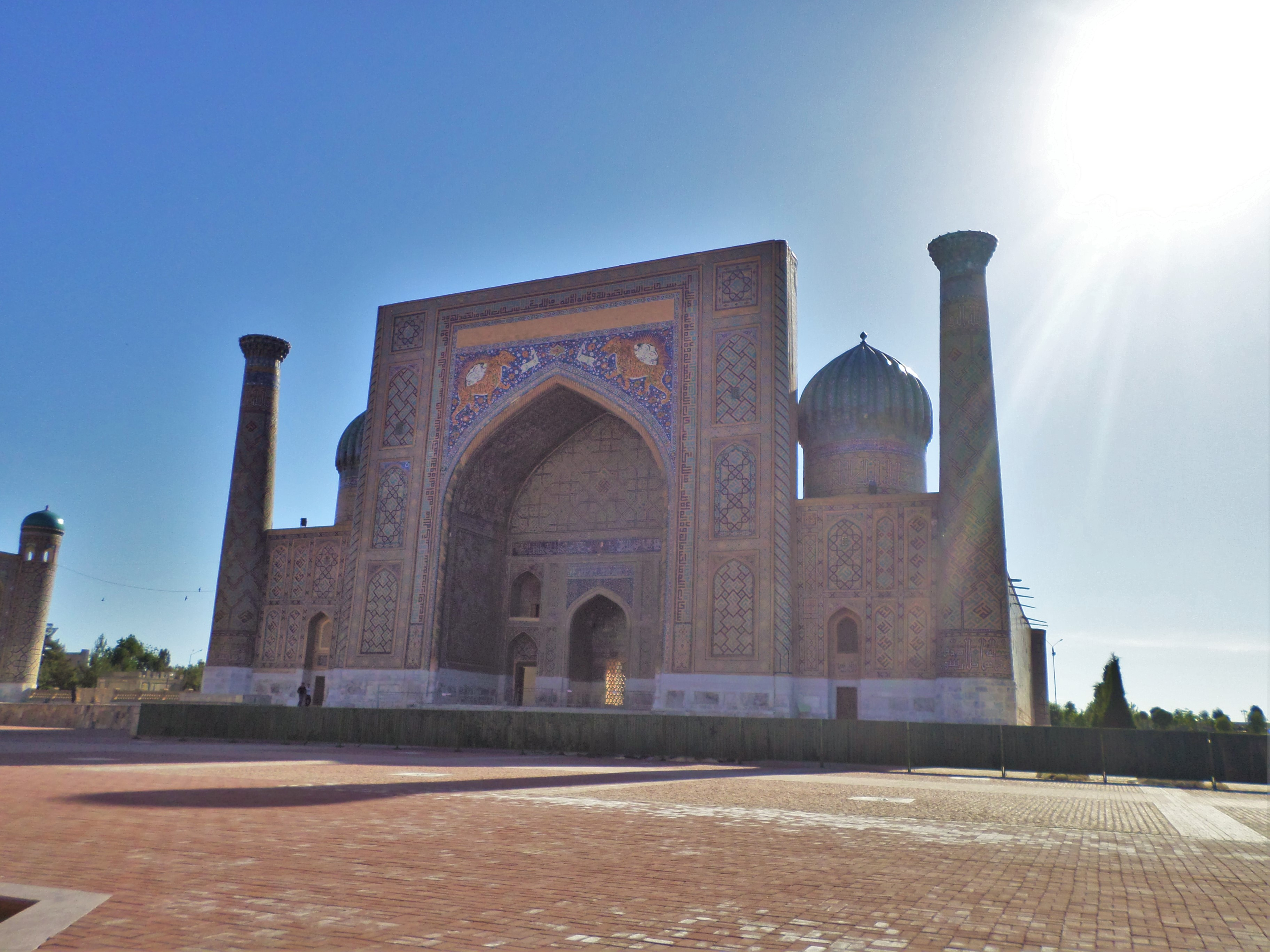 Registan Sherdor madrassah Медресе Шердор 2014г.